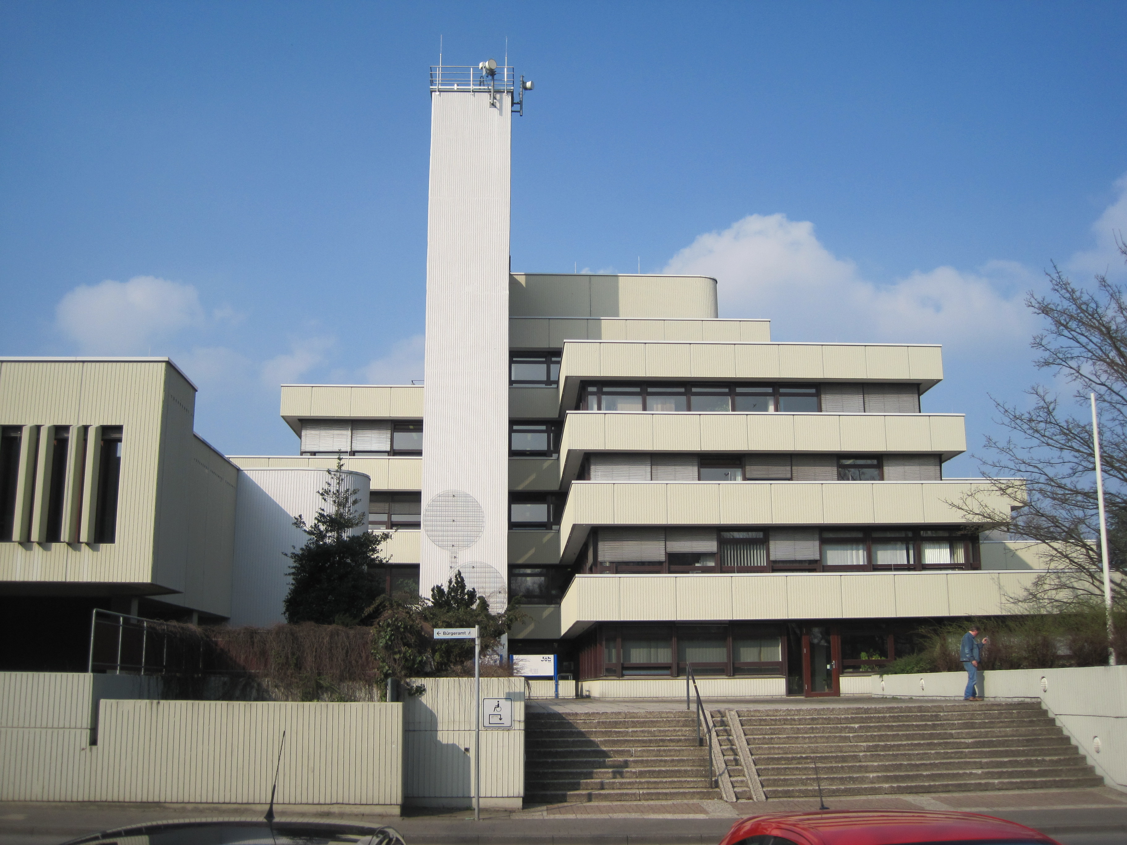 Das Foto zeigt den rechten Teil das Rathauses Bockum-Hövel mit Blick von der Rautenstrauchstraße.